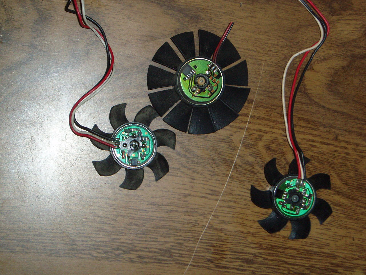 Los ventiladores de ordenador son motores sin escobillas. En la imagen se muestra el circuito impreso que los controla.